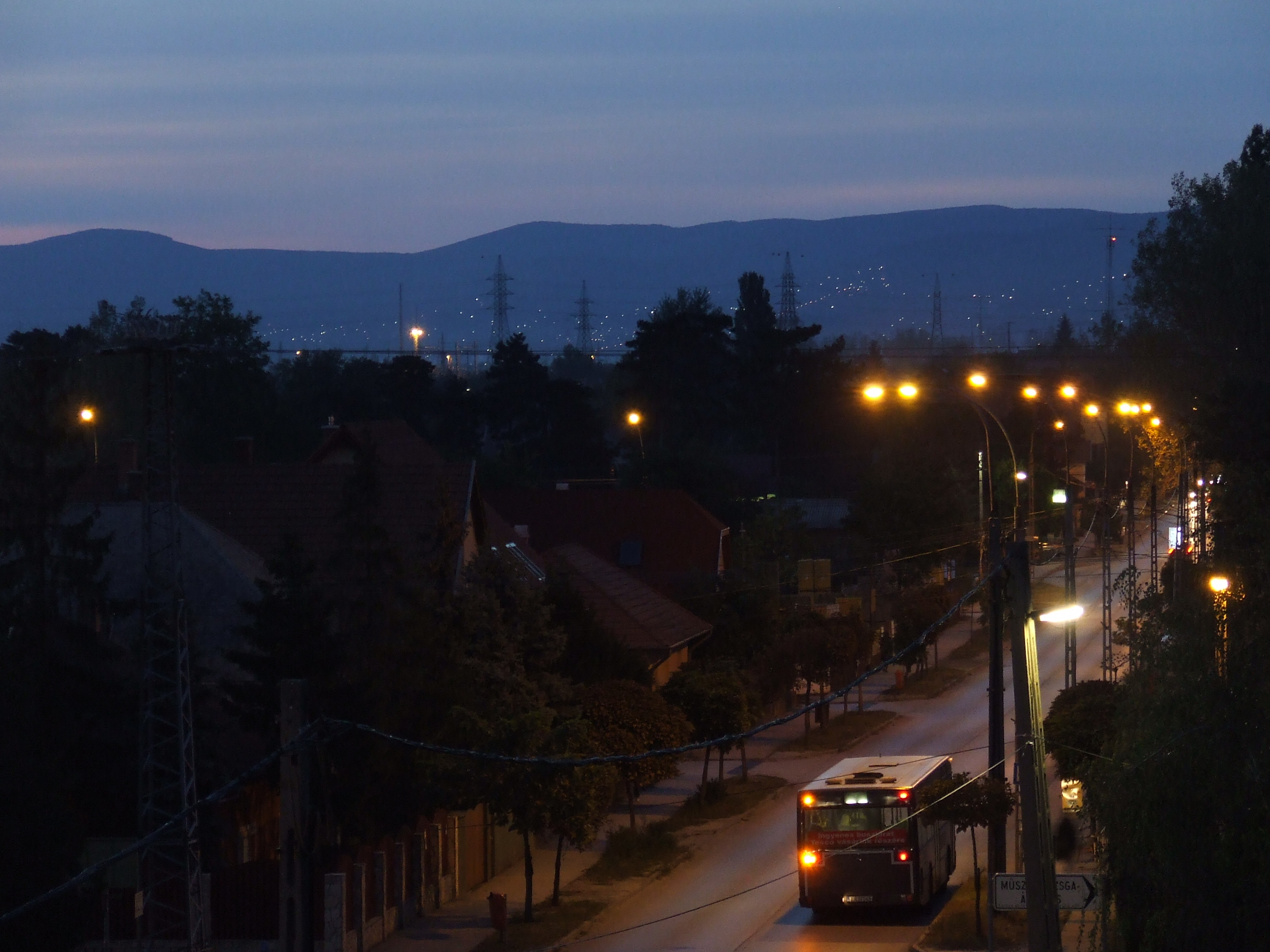 Fót, Móricz Zsigmond utca